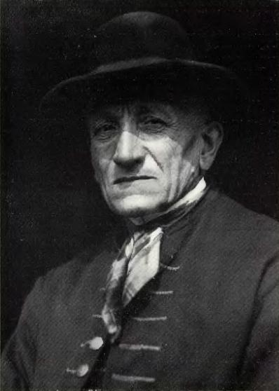 Bauer aus Roßberg in Oberschlesien in Tracht